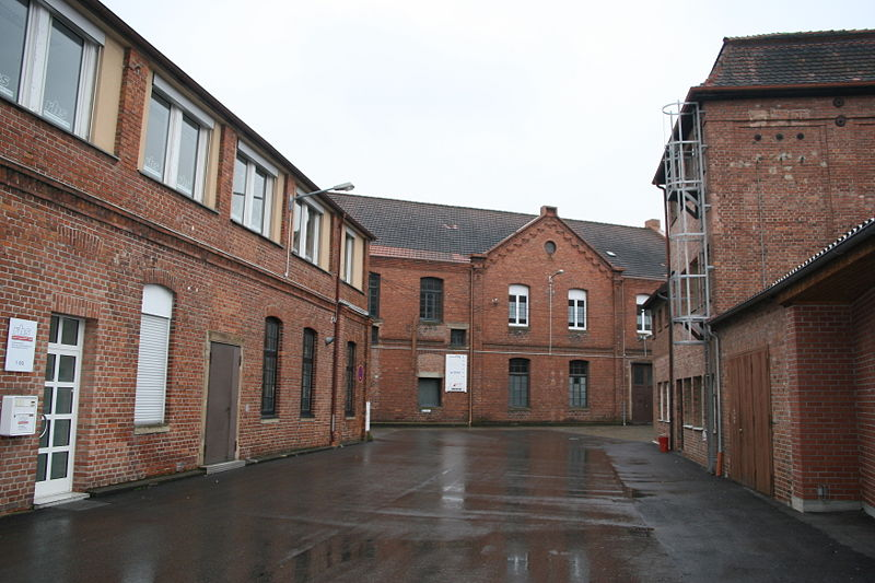 Einfahrt der Firma Röcker. Der Bach befinder sich unter der Einfahrt